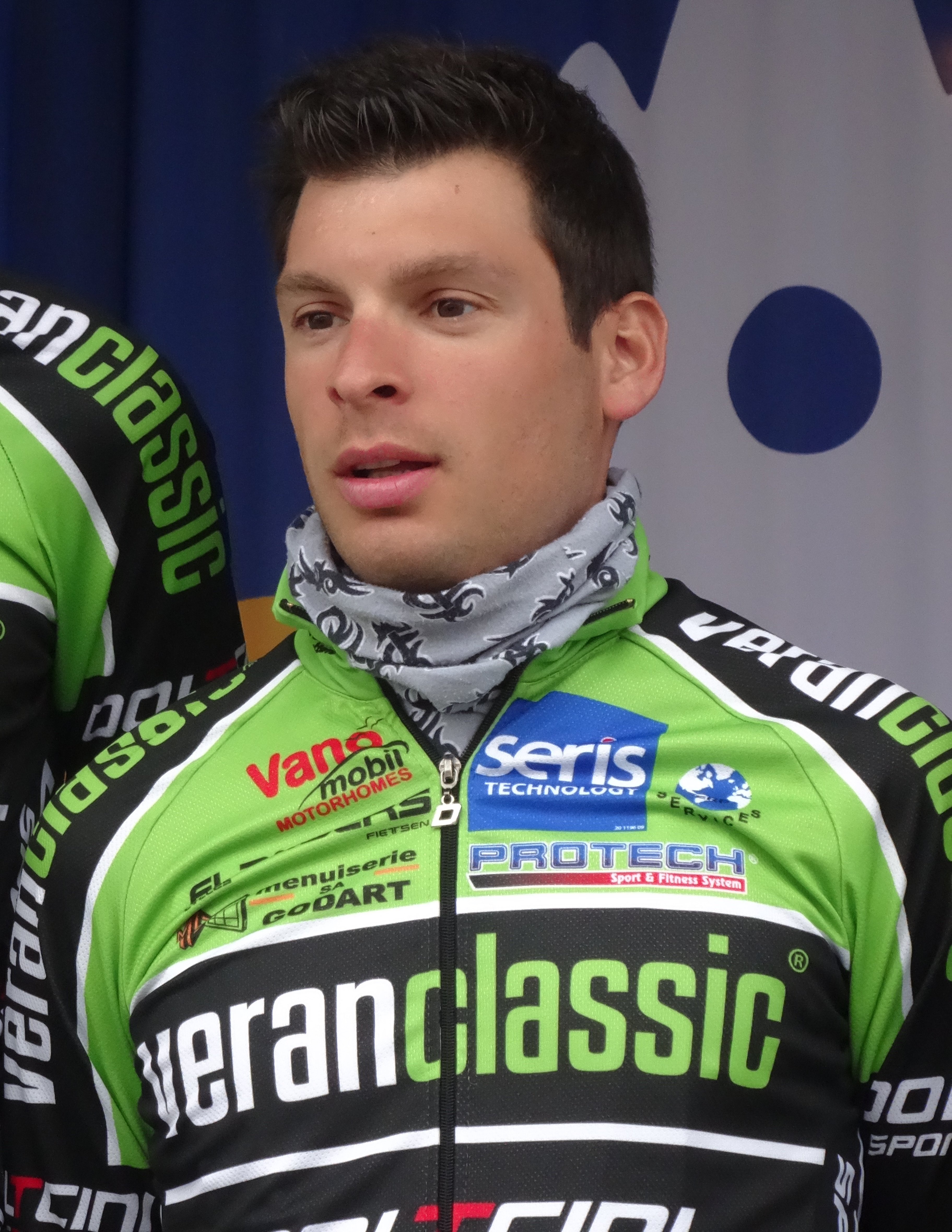 Reportage photographique réalisé le jeudi 8 mai 2014 au départ de la deuxième étape de l'édition 2014 des Quatre jours de Dunkerque à Hazebrouck, Nord, Nord-Pas-de-Calais, France. Depicted person: Sascha Weber Depicted team: Veranclassic-Doltcini